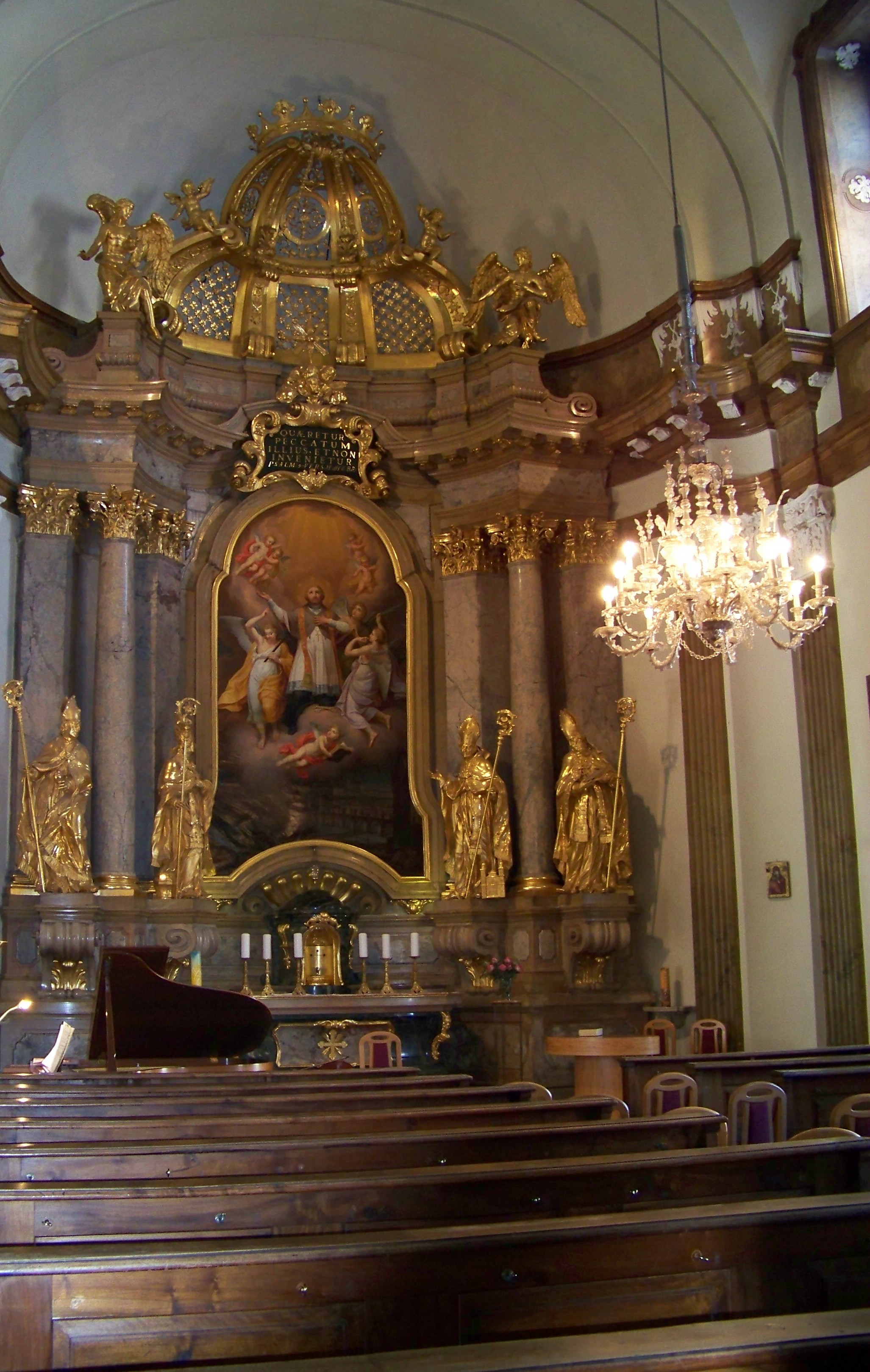 Schlosskirche Mirabell in der Stadt Salzburg